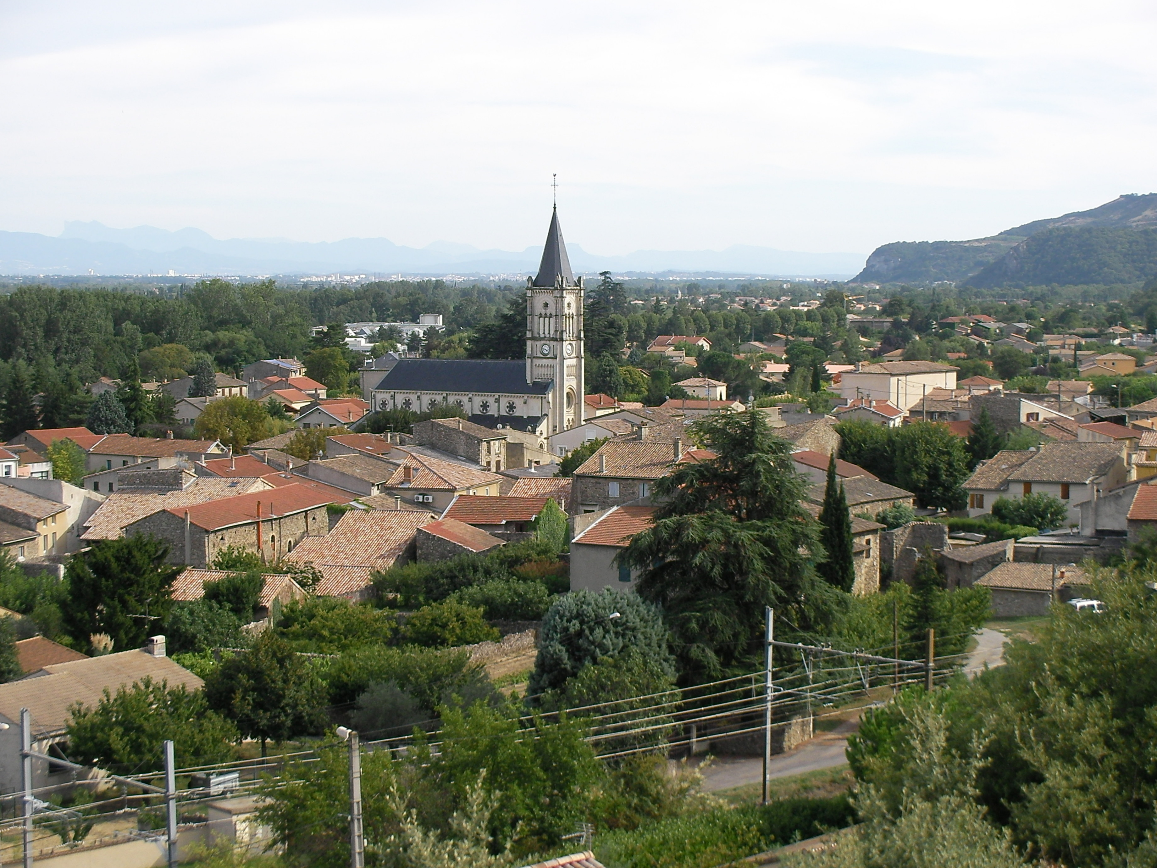 vue du village de Mauves